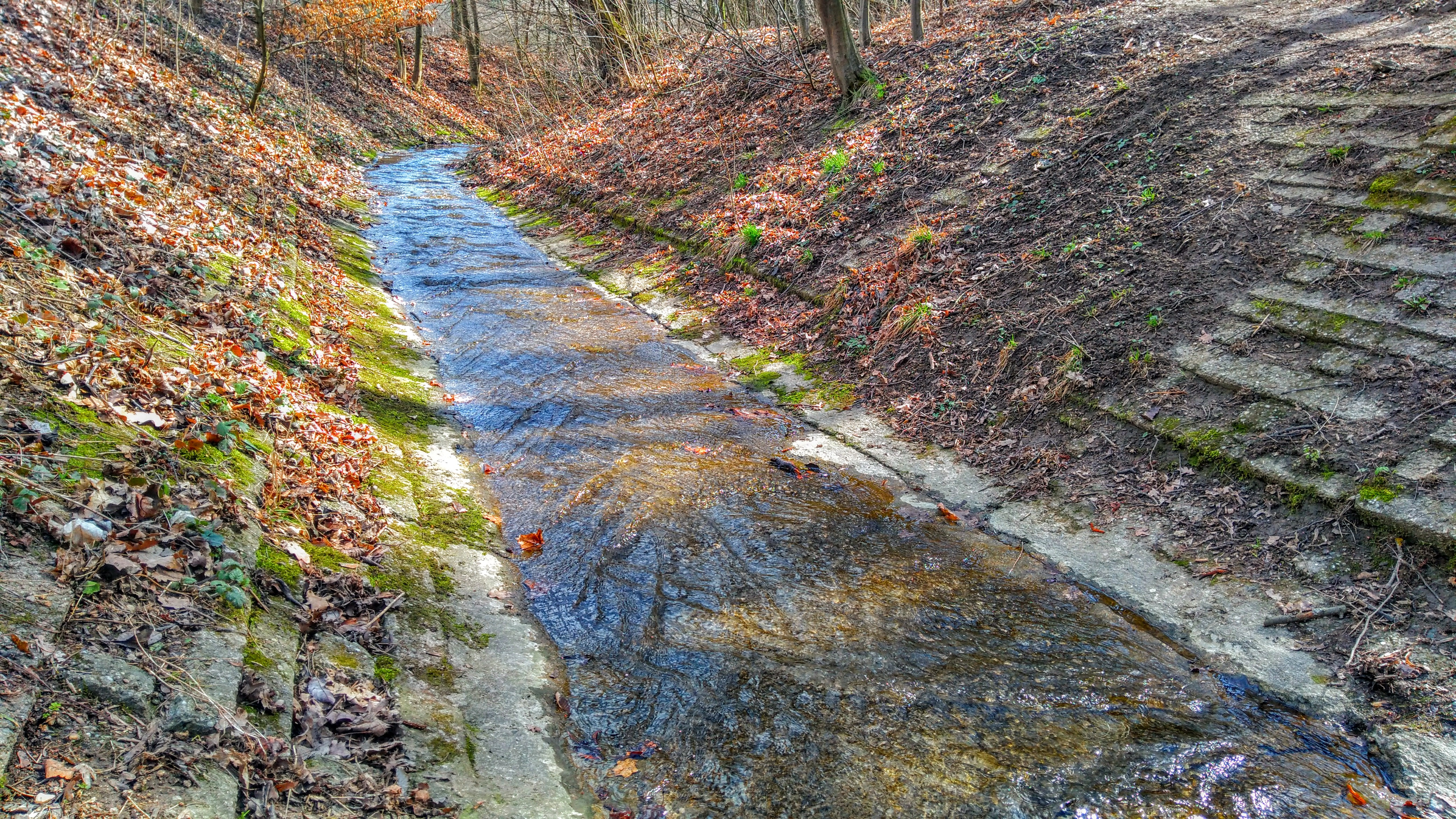 Potok Vrbovec v Bystrci.